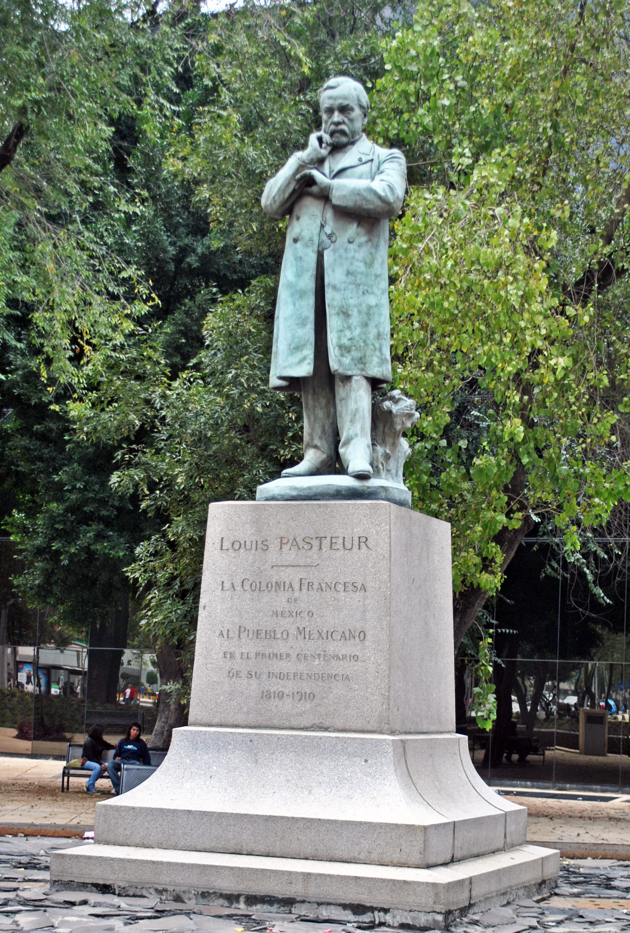 Escultura de Louis Pasteur donada por Francia a México en los festejos del Centenario de la Independencia.